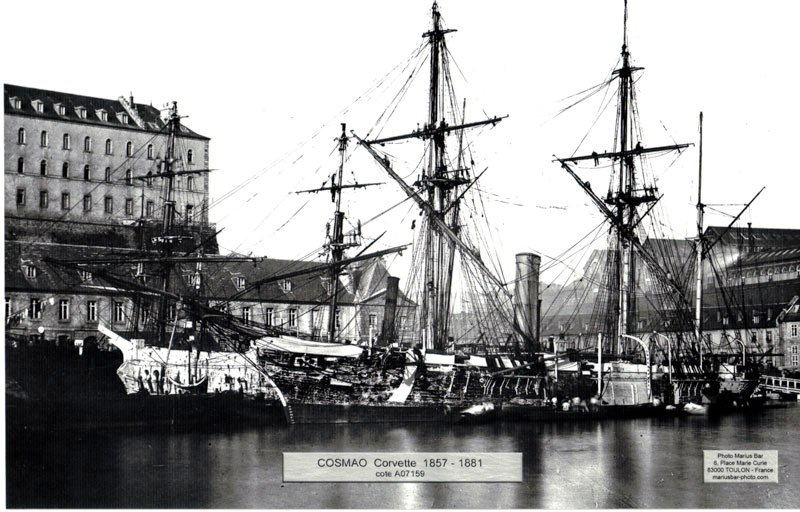 Reproduction de la photographie de la corvette Cosmao